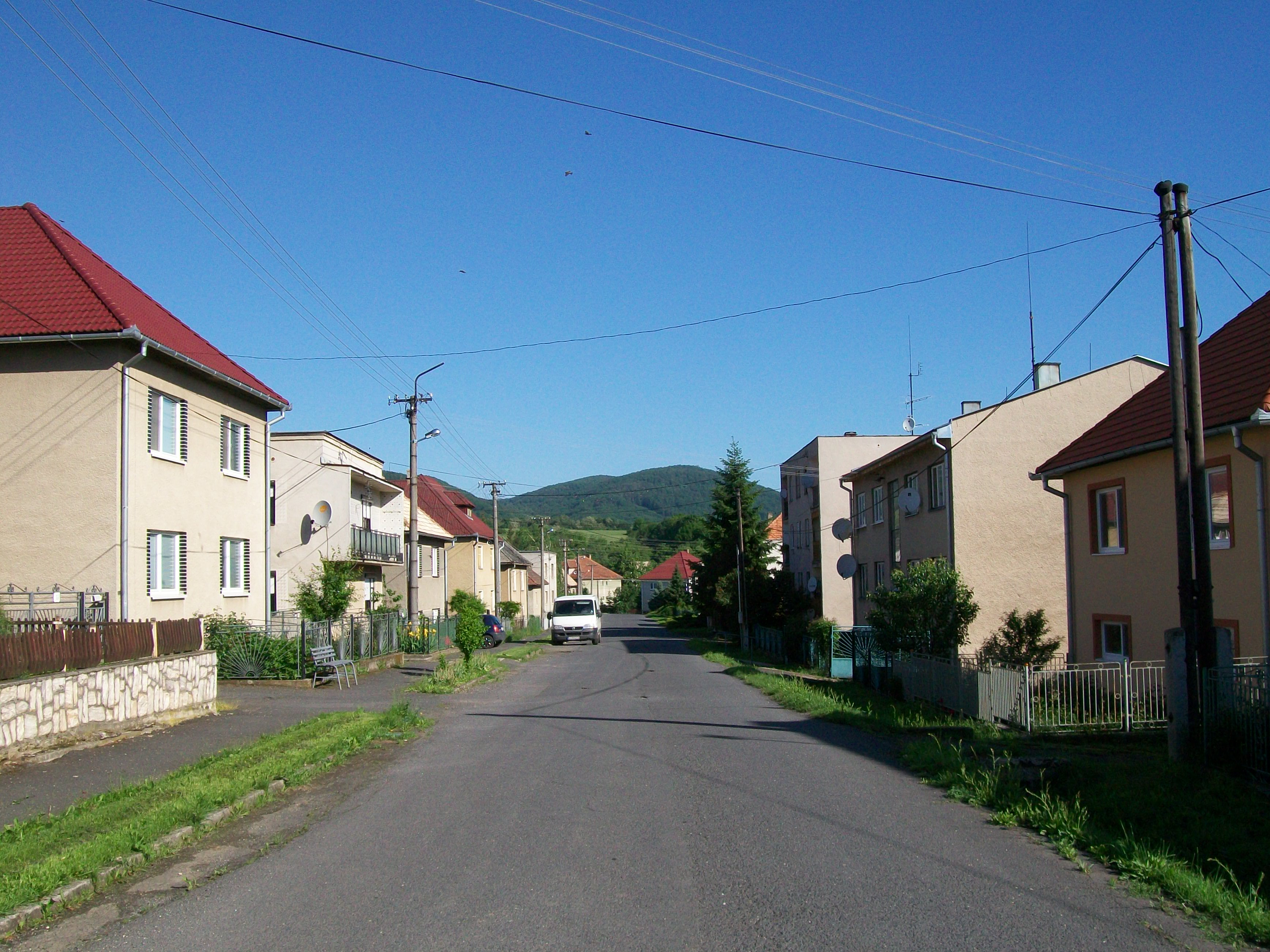 Ulica obce Lehôtka v okrese Lučenec